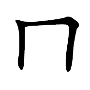 мо чжуинь